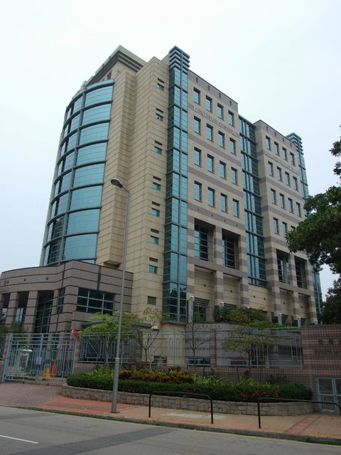 粉嶺裁判法院